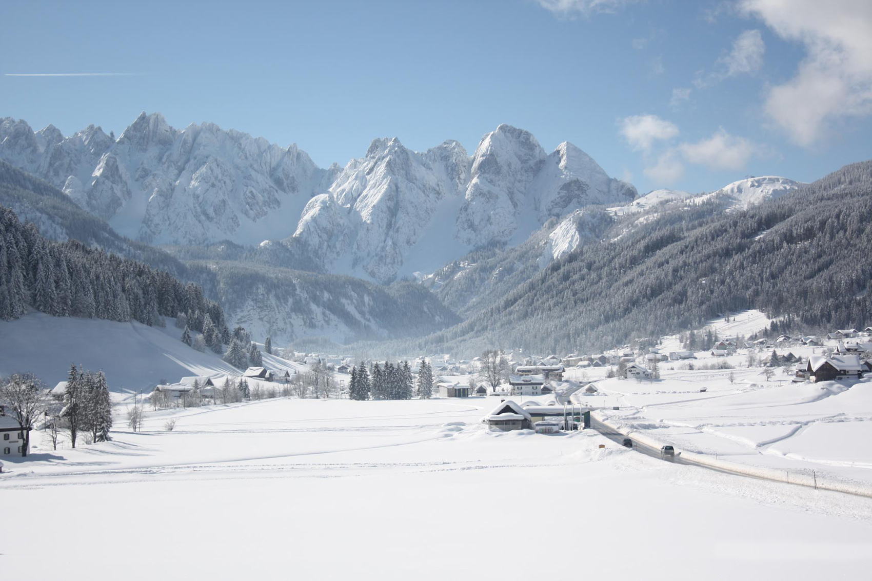 Blick über das winterliche Gosautal zum Gosaukamm